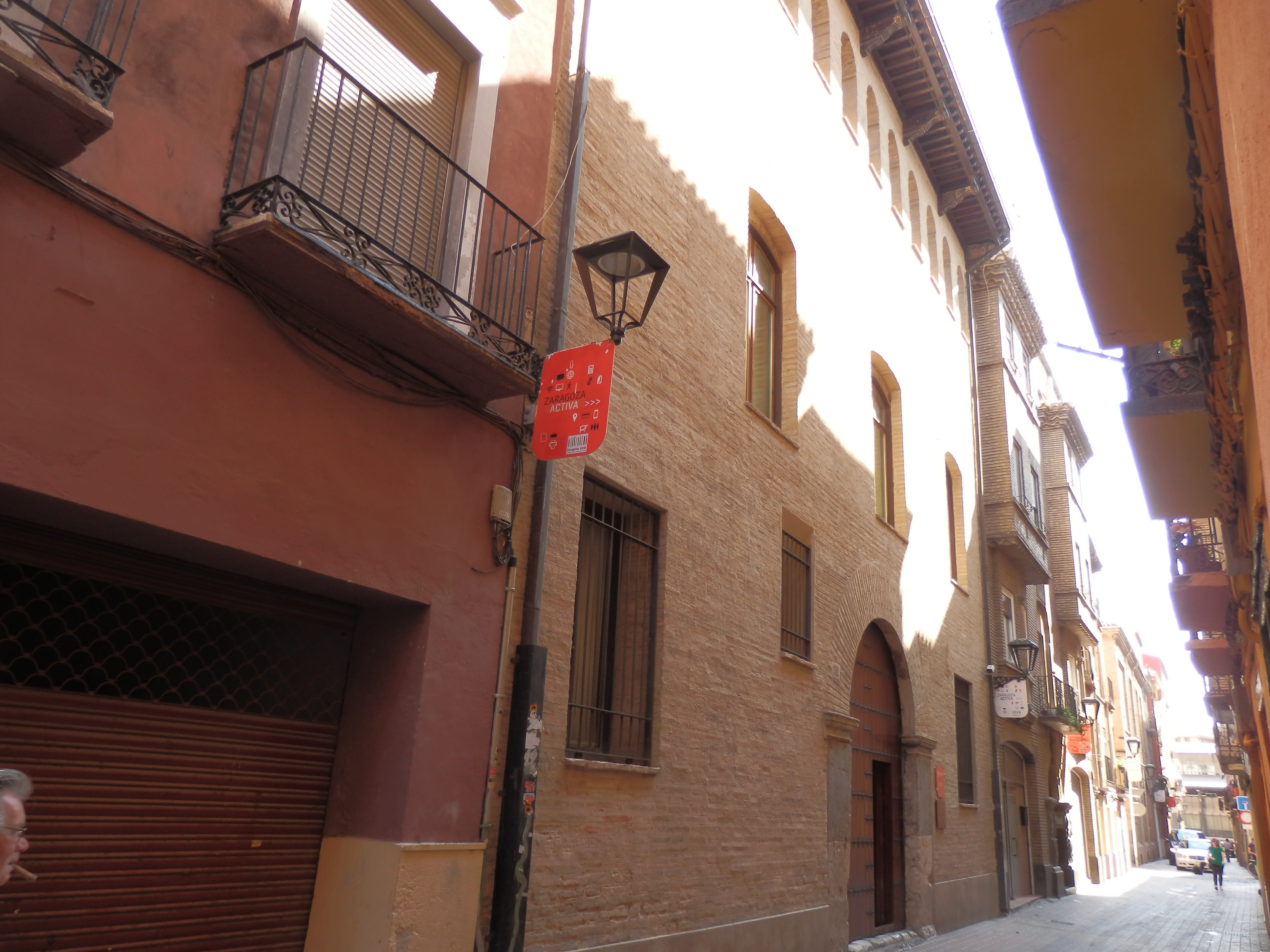 Edificio situado en la calle Armas, 32, de Zaragoza, España. Es bien de interés cultural (BIC) de la provincia de Zaragoza.